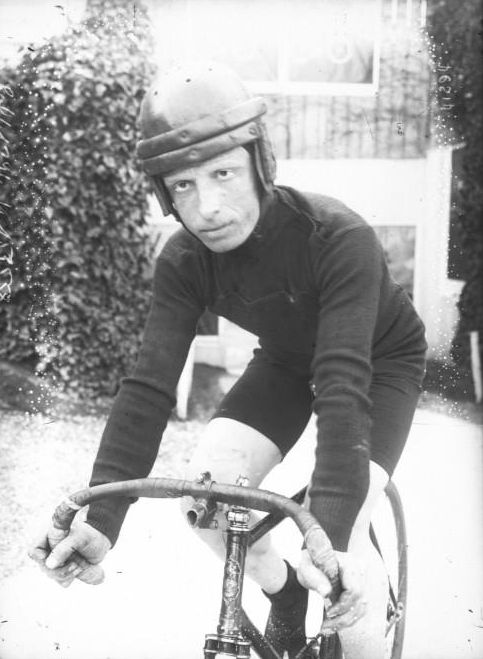 Sérès, cycliste assis sur son vélo